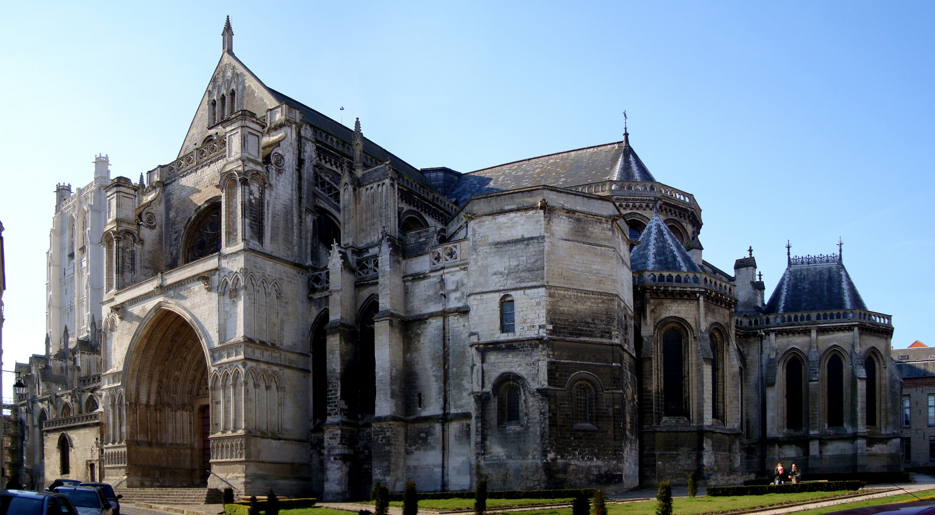 La cathédrale Notre-Dame de Saint-Omer (Pas-de-Calais).